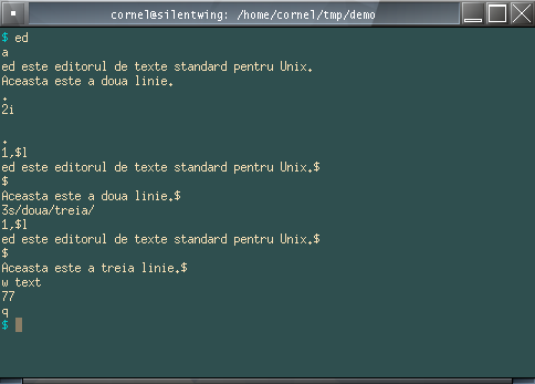 Captură sesiune ed cu text românesc.